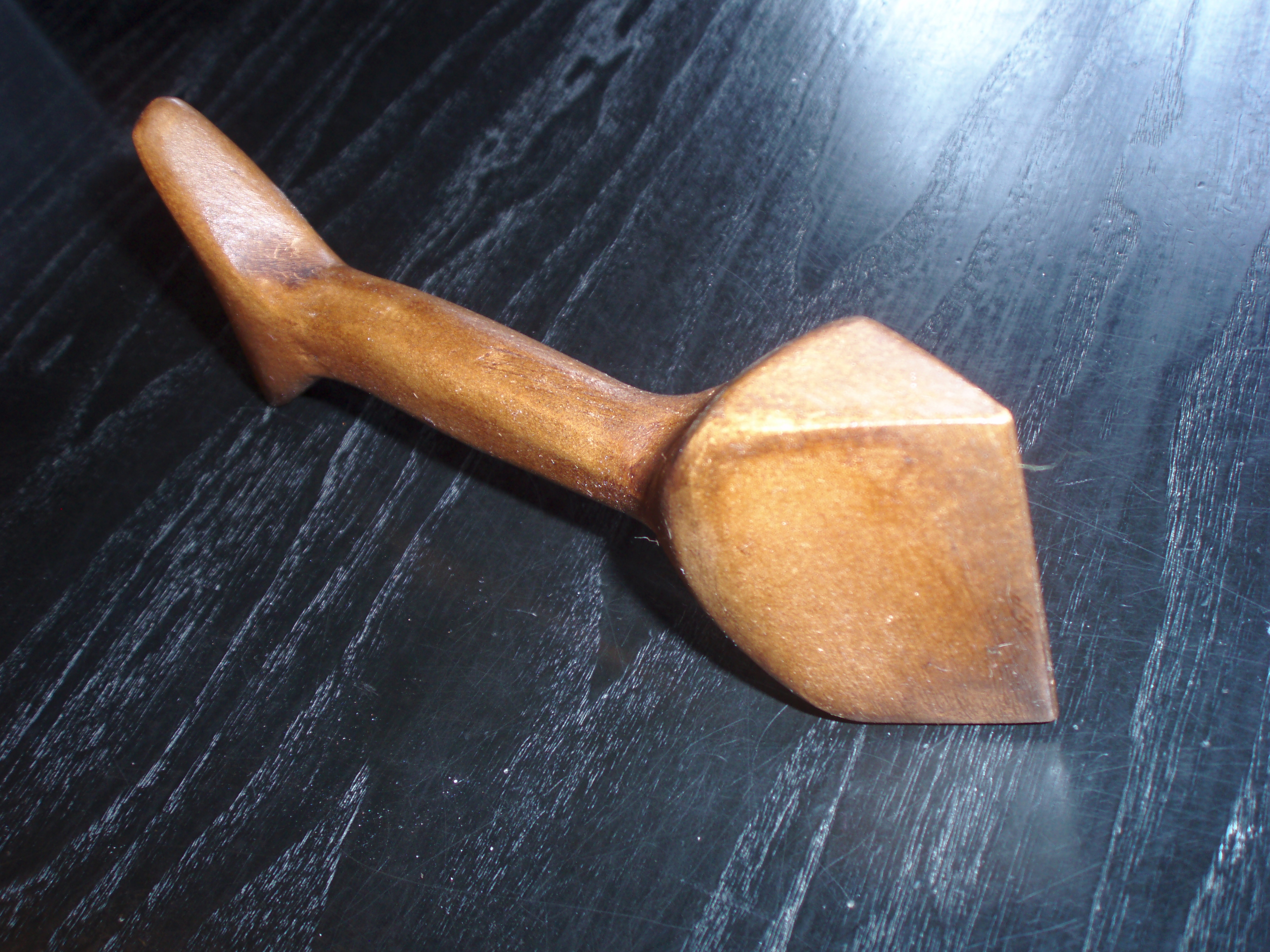 Photo d'un aplatisseur de voile